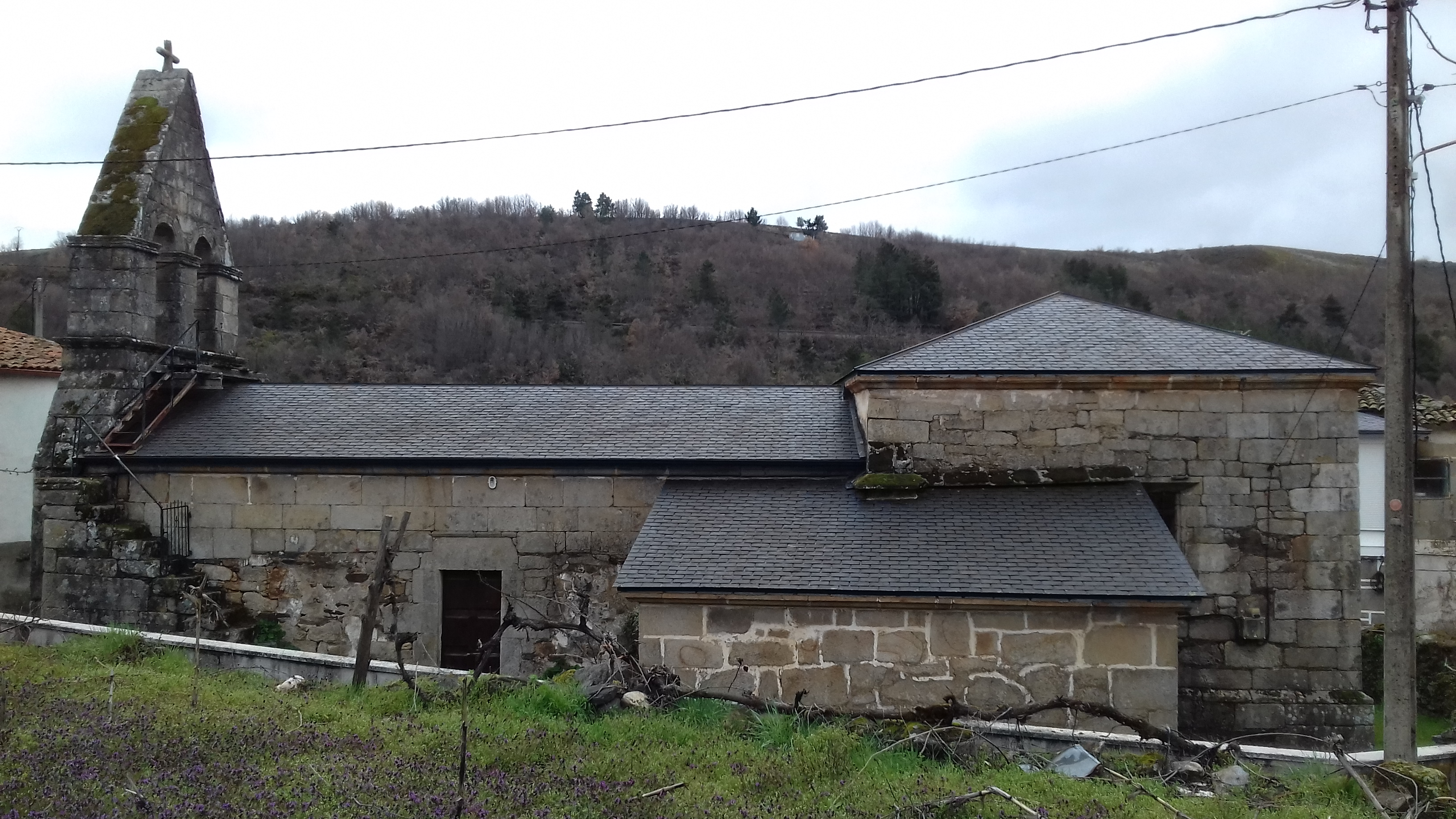 Igrexa parroquial de Pradocabalos, Viana do Bolo